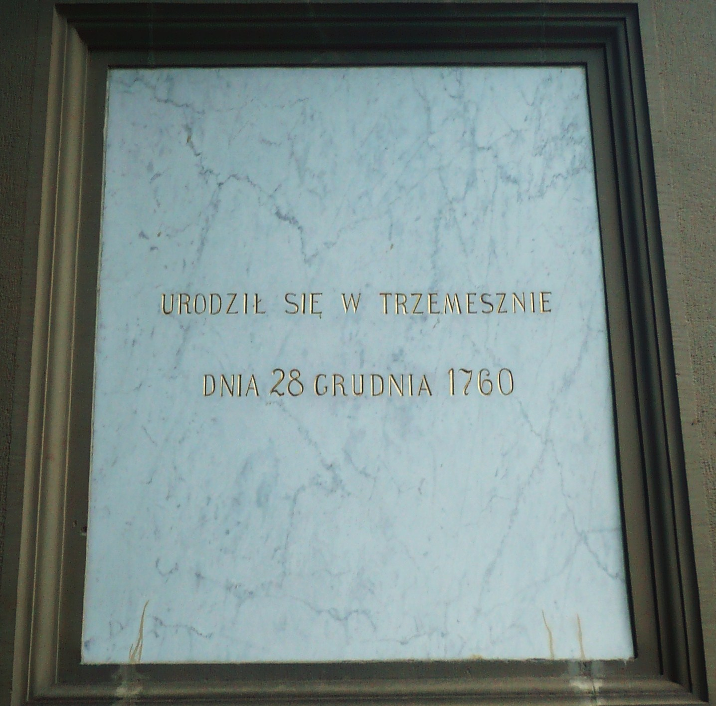 Lwów. Pomnik Kilińskiego